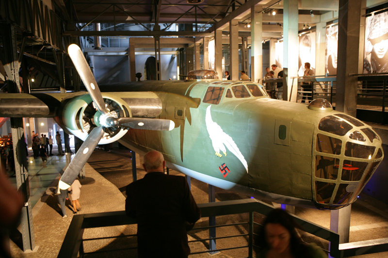 Fragment ekspozycji w Muzeum Powstania Warszawskiego. Replika bombowca B-24J-45-CF o numerze seryjnym 44-10395 wyprodukowanego w Fort Worth w Teksasie. Jedyna na świecie replika tego samolotu w skali 1:1, powstała w oparciu o oryginalną dokumentację techniczną, nigdzie wcześniej nie publikowane zdjęcia oraz rozmowy z żyjącymi lotnikami i mechanikami Eskadry 1586. (fot.: Cezary Piwowarski)